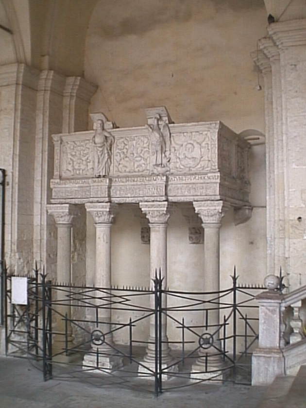 Pergamo di Carlo V (XVI secolo) nell'atrio della chiesa di San Michele a Cagliari